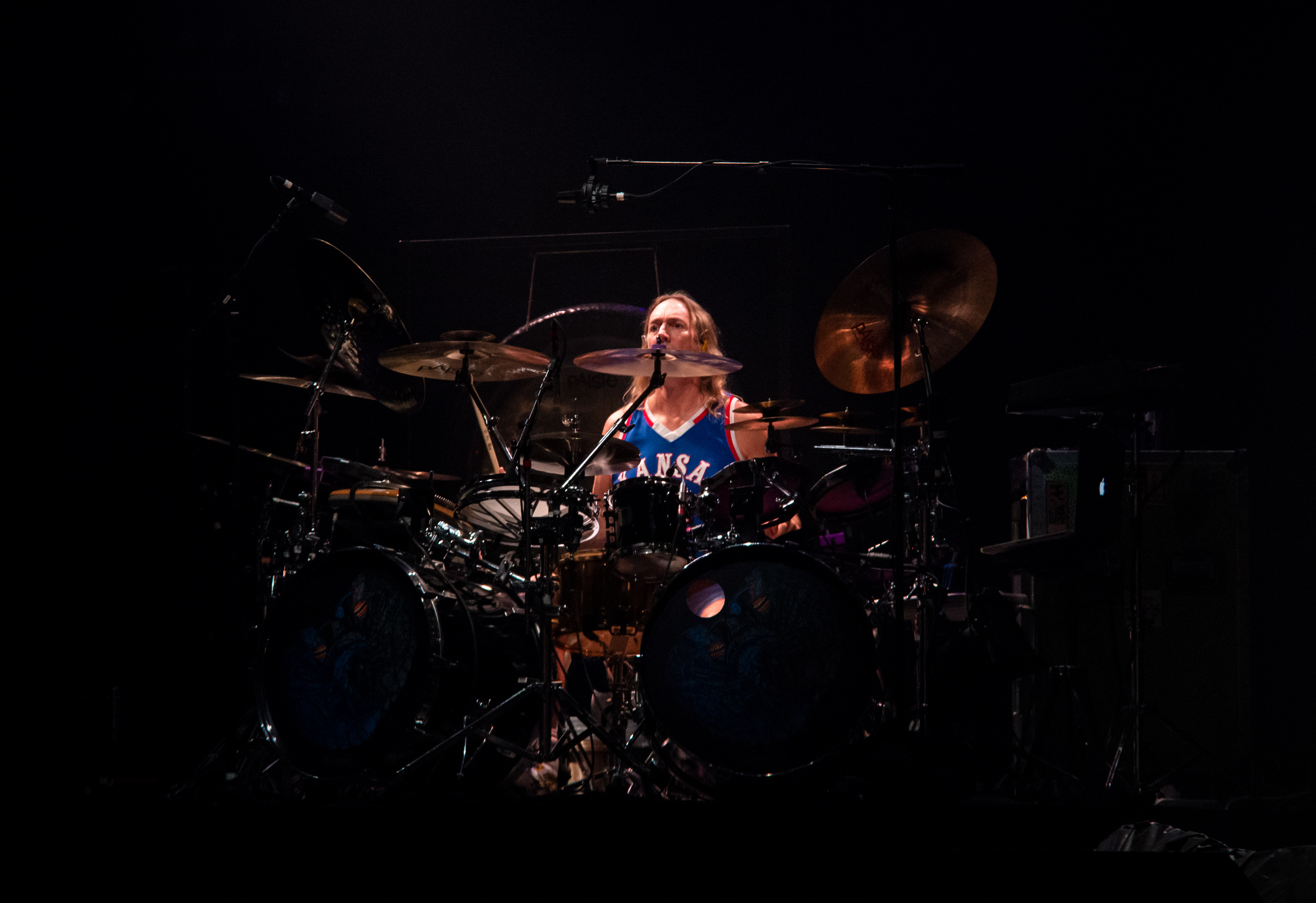 Danny Carey, batteur du groupe américain Tool au Hellfest 2019.